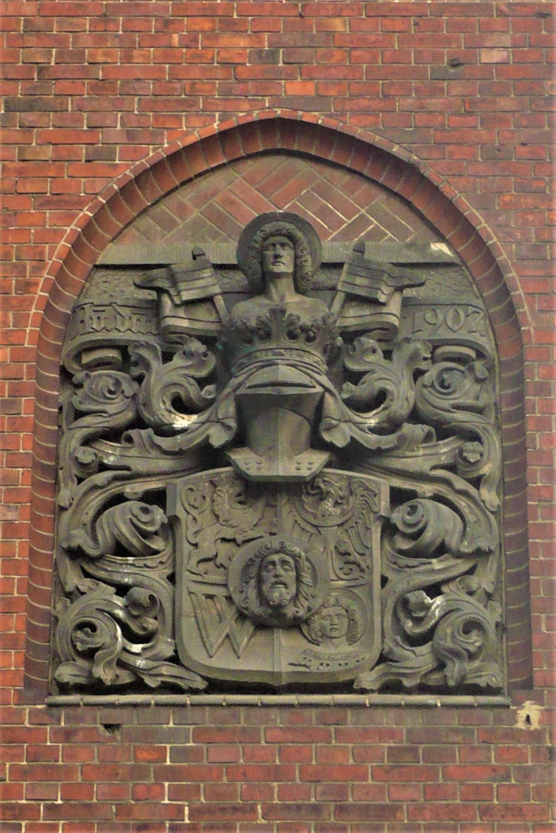 Herb Wrocławia